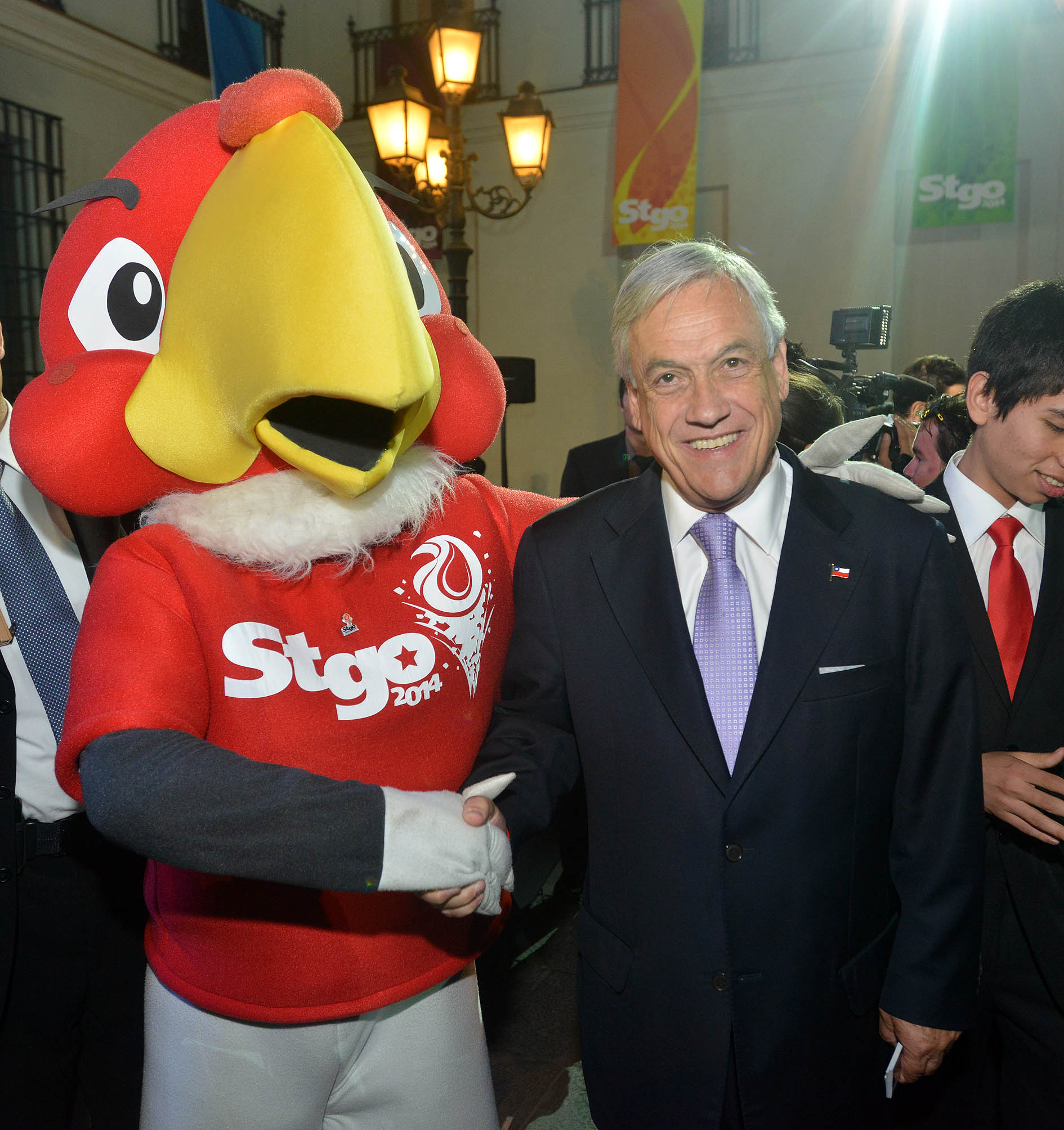 23-12-2013 Gala del Deporte